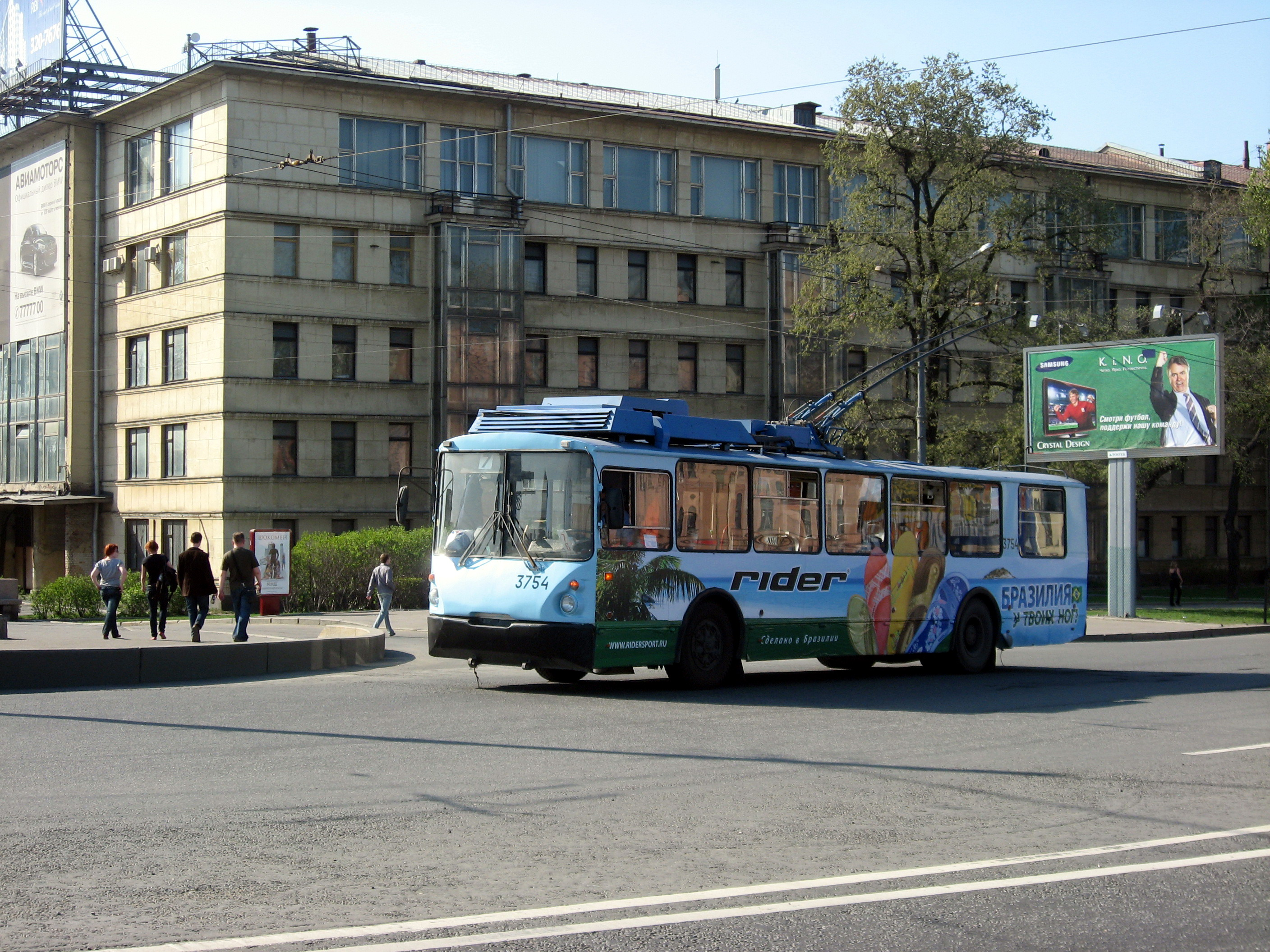 Sankt-Petěrburg, fotka trolejbusu